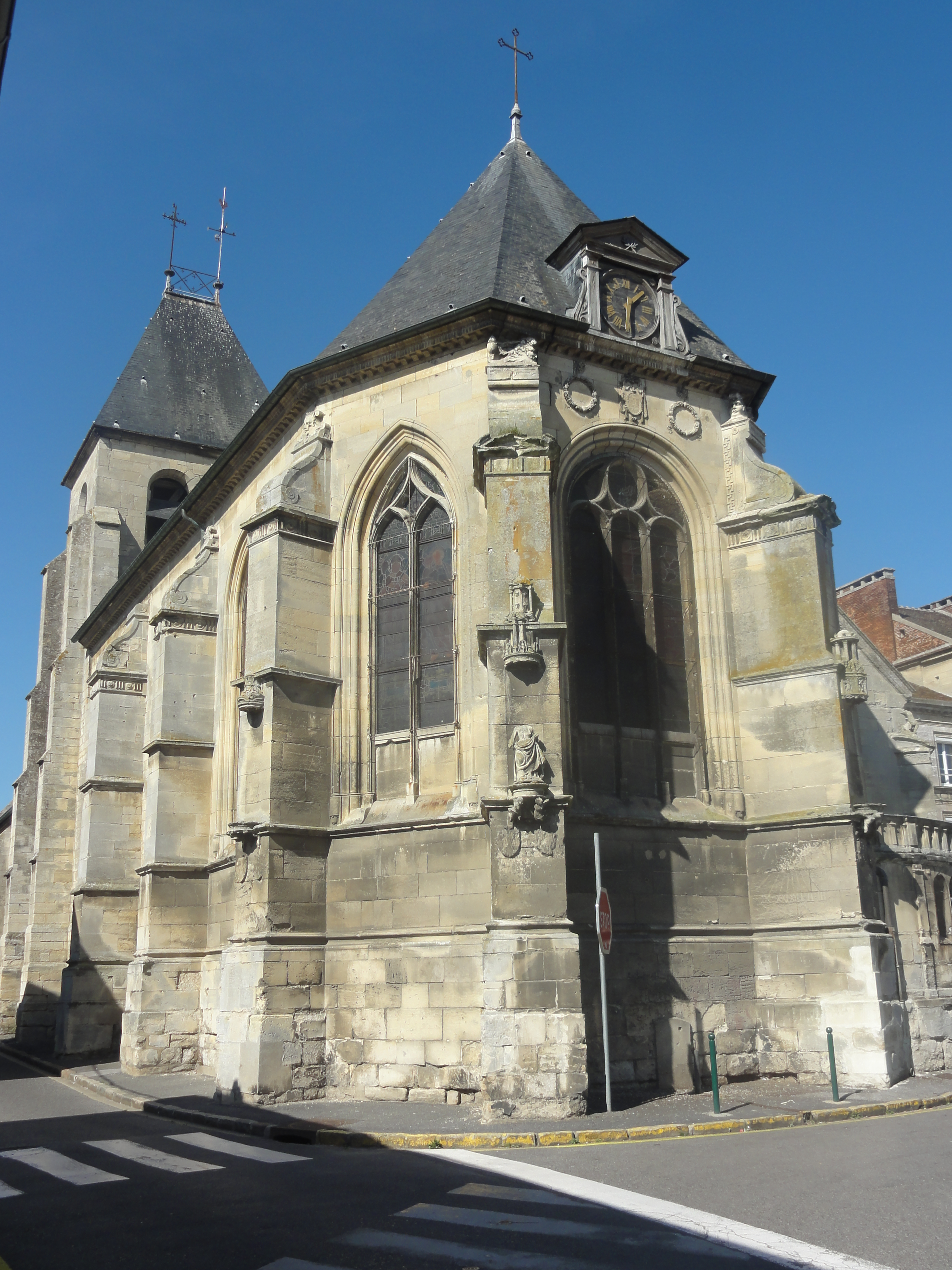 Chevet.